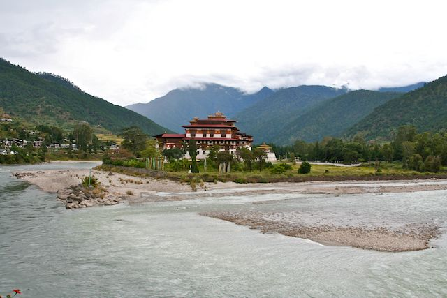 Confluence of Pha Chhu and Mo Chhu near Punakha Dzong